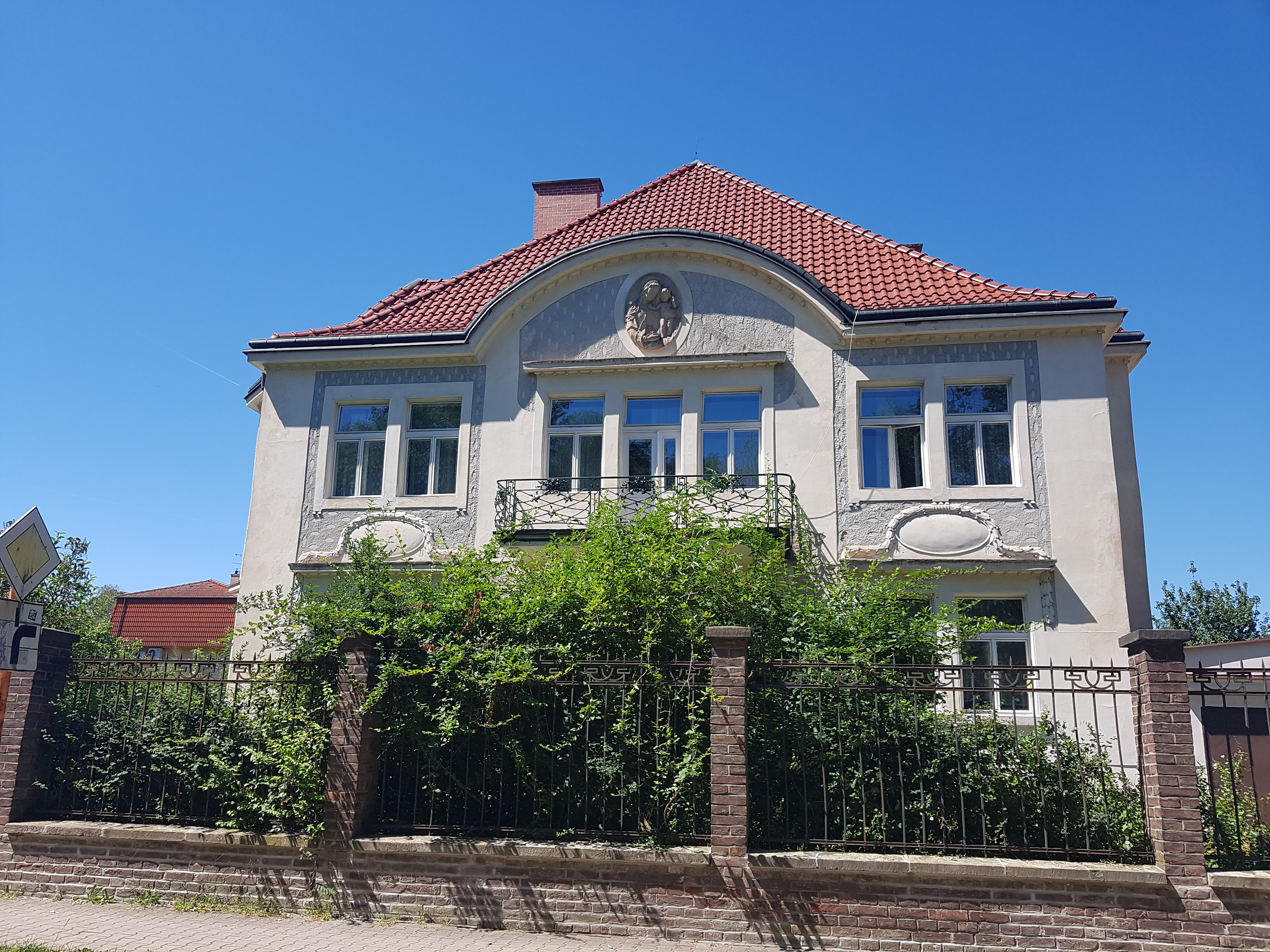 Vila Bohumila Hobzeka v Hradci Králové (2020)